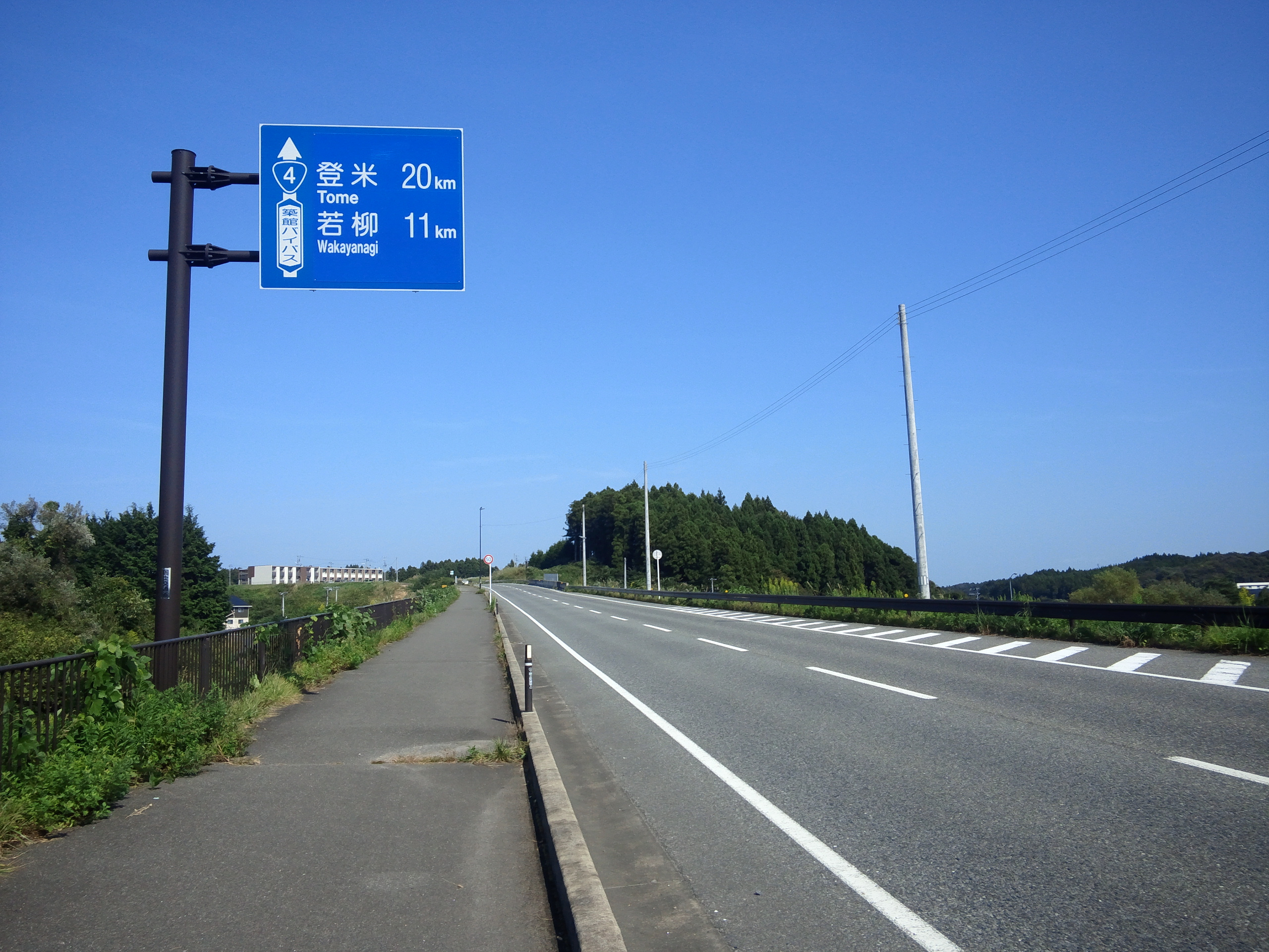 国道4号線築館バイパス 宮城県栗原市築館南内沢付近（志波姫方面側を撮影）